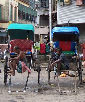 Popis: Rikše pred chrámom Káli Zdroj: Dátum: júl 2005 Autor: redaktor: ham Povolenie: GFDL Iné verzie tohto súboru